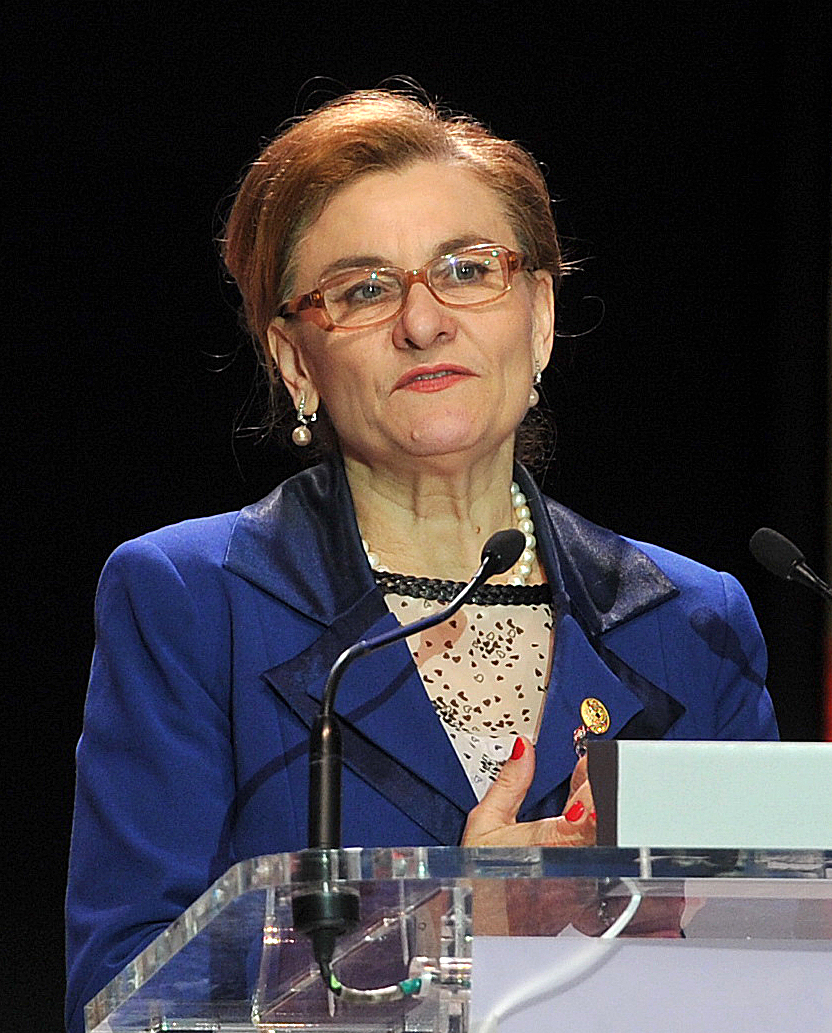 Maria Grapini la Reuniunea OFSD, Primavara social democrata - 08.03.2014